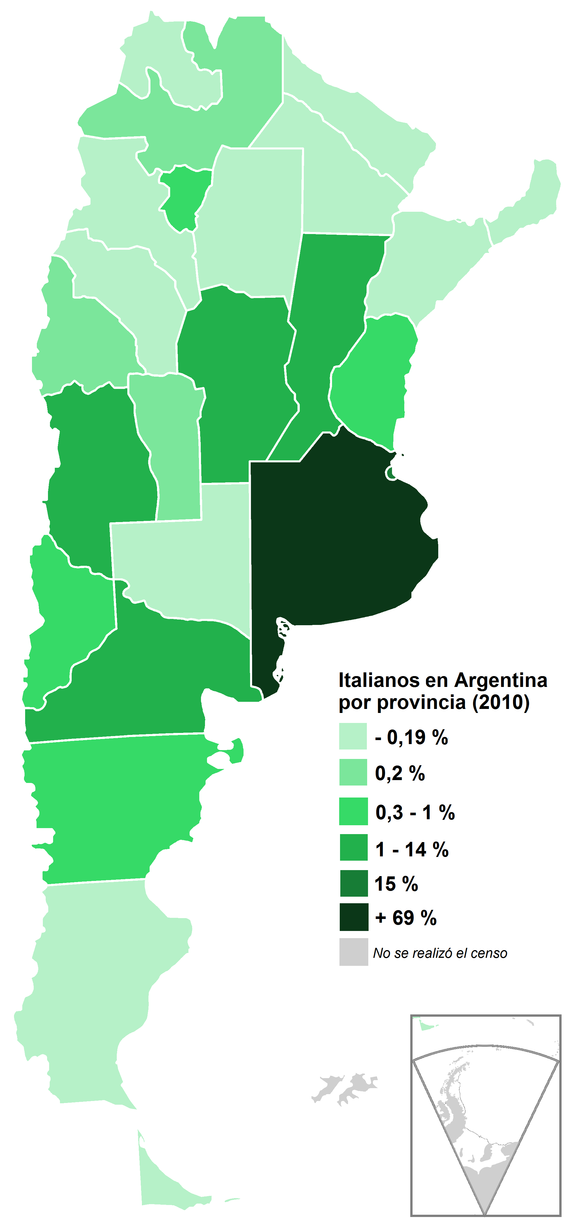 República Argentina por provincia. Población nacida en Italia, en porcentaje. Año 2010. Fuente: Censo 2010 - INDEC.